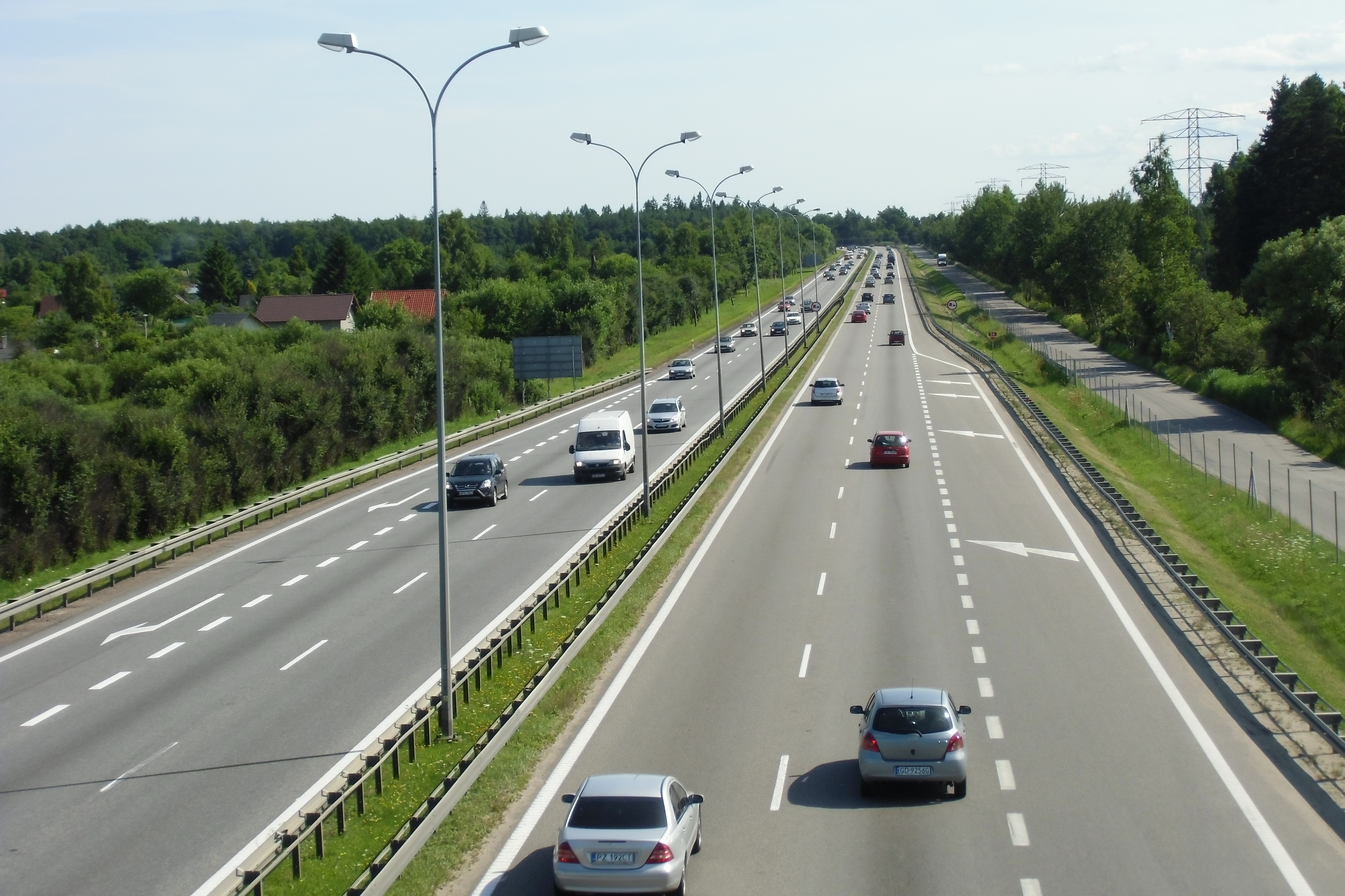 Obwodnica Trójmiasta